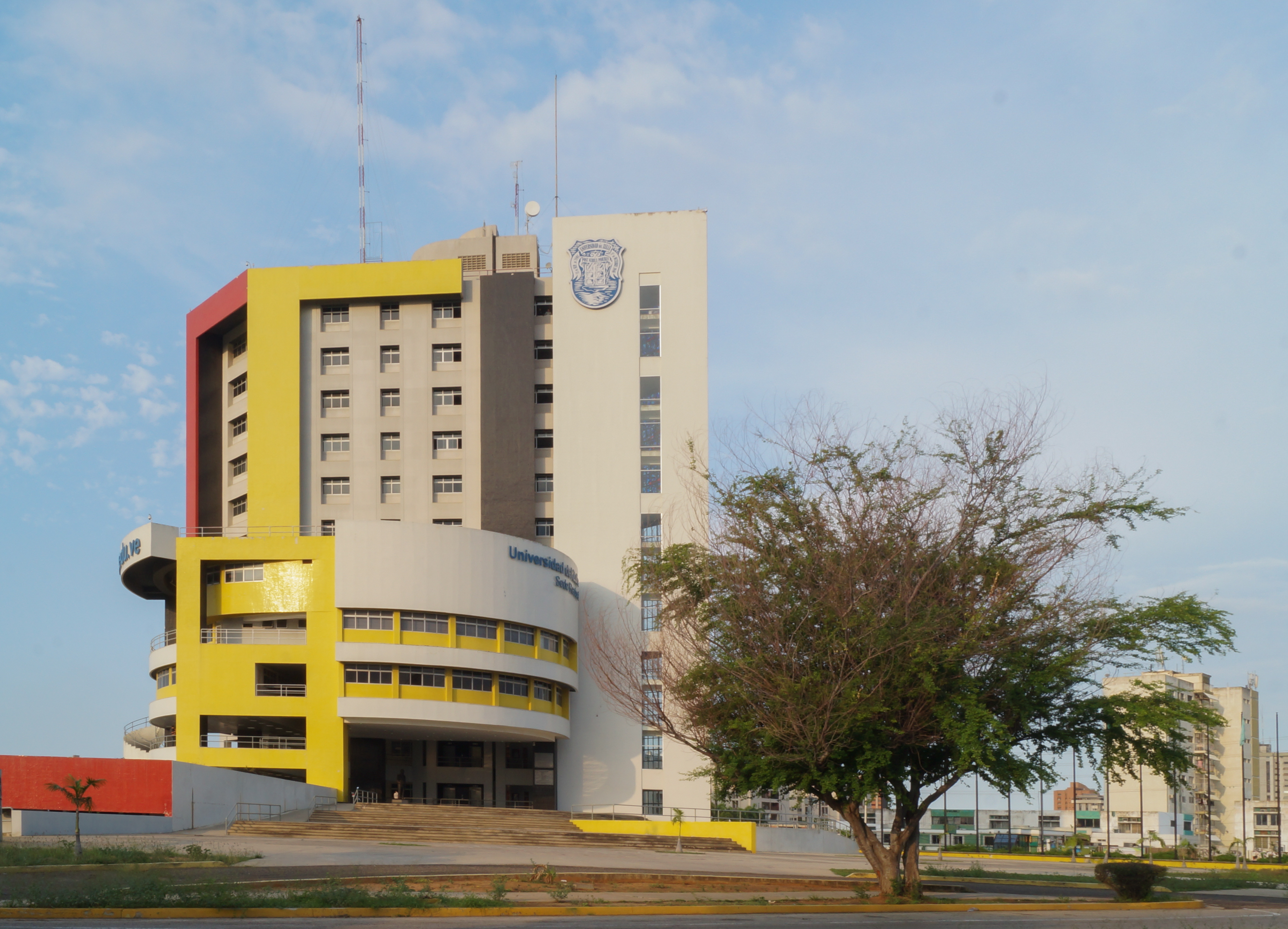 Sede Rectoral. Universidad del Zulia, Maracaibo. Estado Zulia